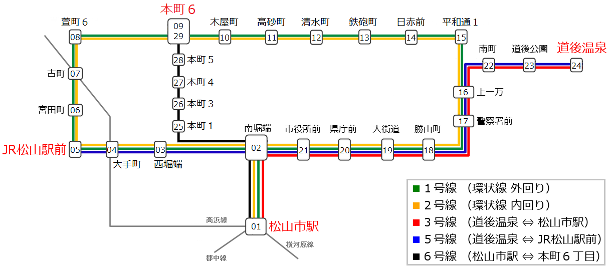 松山市内線の運行系統図。